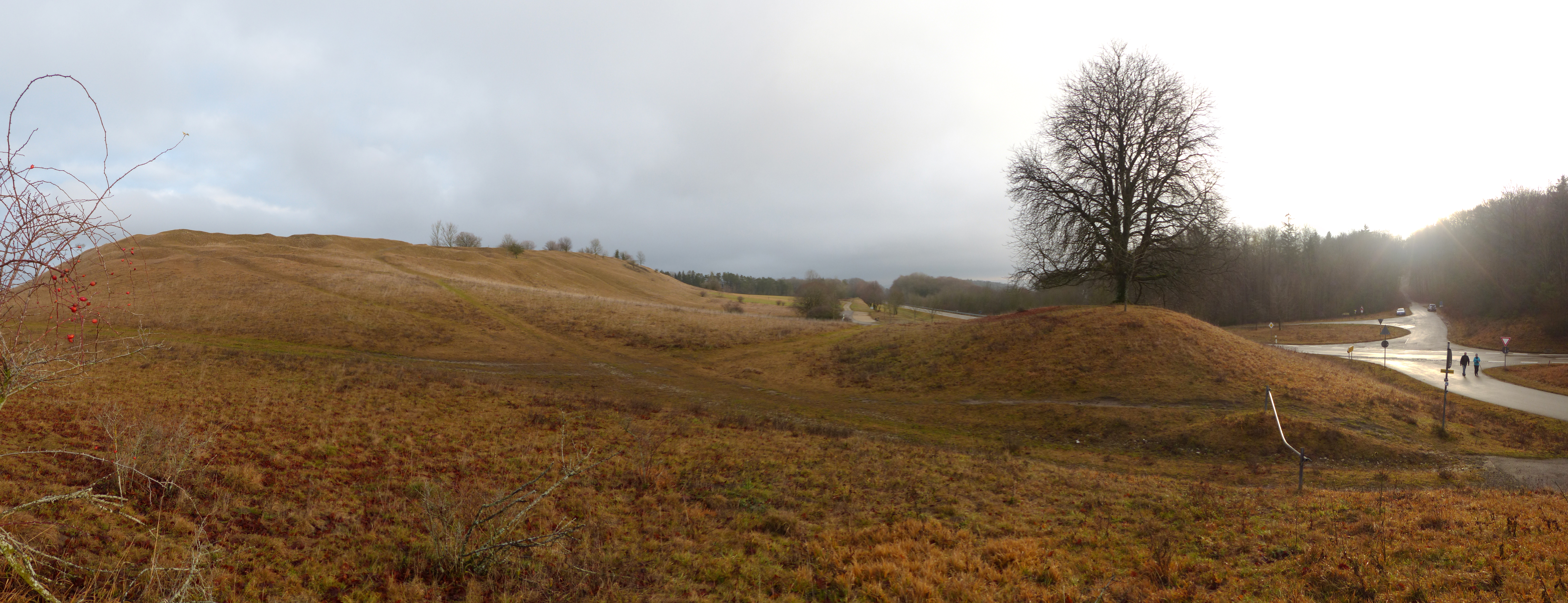 Gelber Berg Panorama (2019)